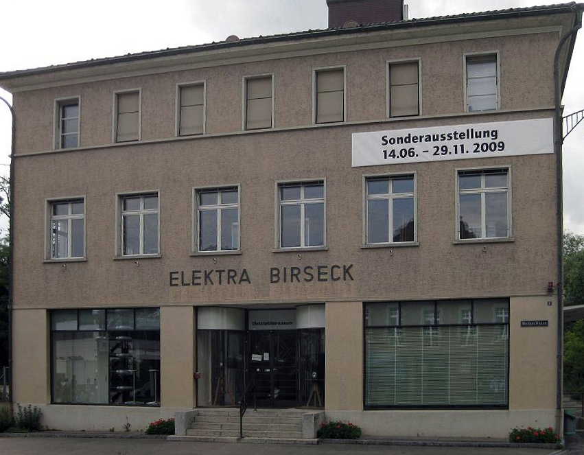 Elektrizitätsmuseum Münchenstein Switzerland